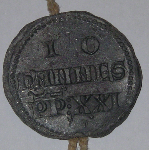 Bolla del papa Giovanni XXI, appesa ad un rescritto all'arcivescovo di Messina, 5 november 1276, dato a Viterbo